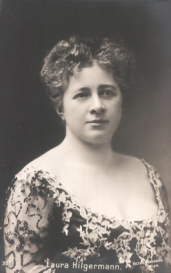 Hilgermann Laura osztrák operaénekesnő (mezzoszoprán) és énektanár